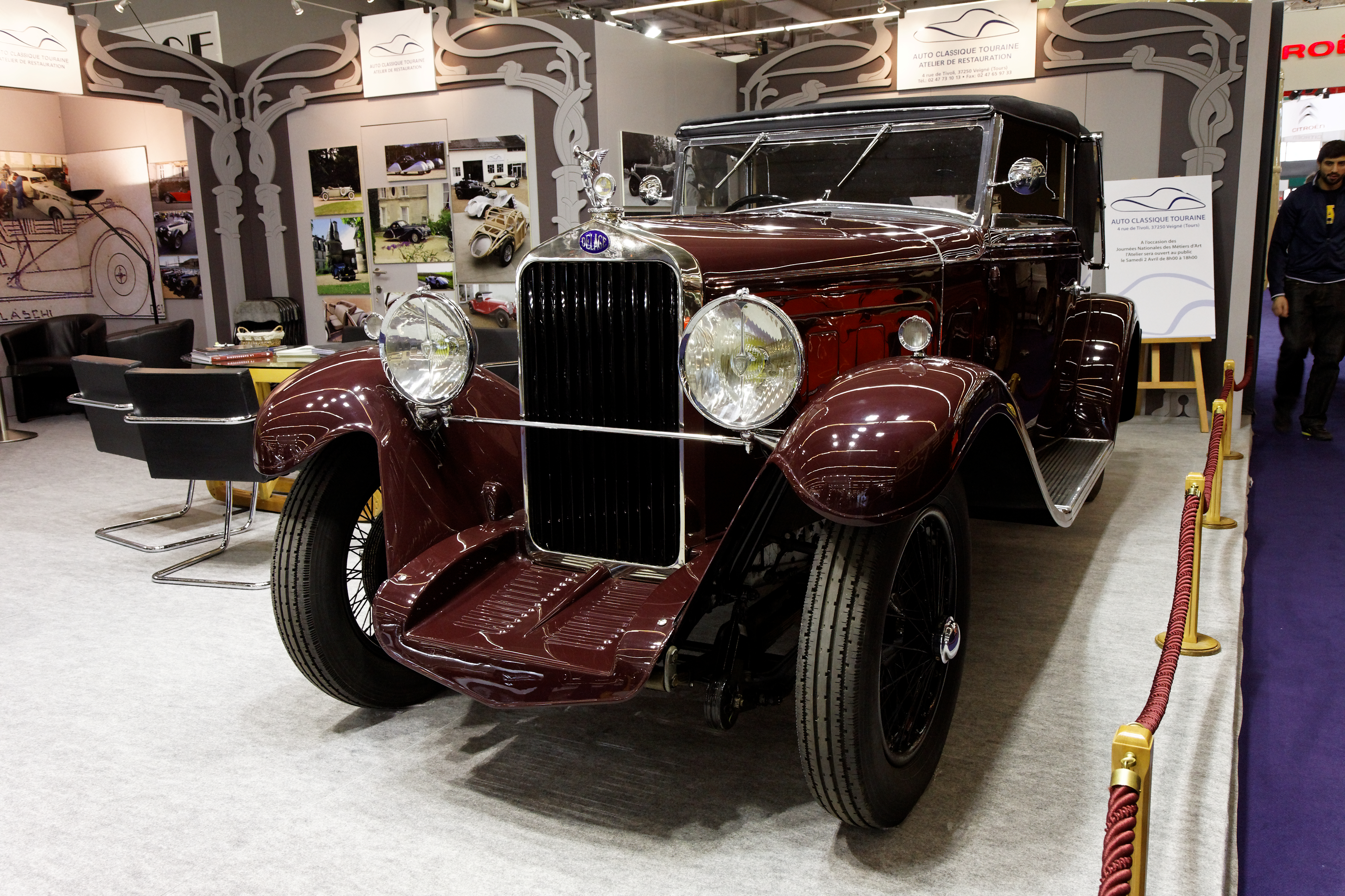 Photographie prise lors du salon rétromobile 2011 à Paris, porte de Versailles.